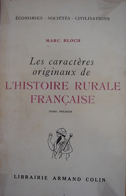 Couverture du livre de Marc Bloch, Les Caractères originaux de l'hitoire rurale française, 1st edition